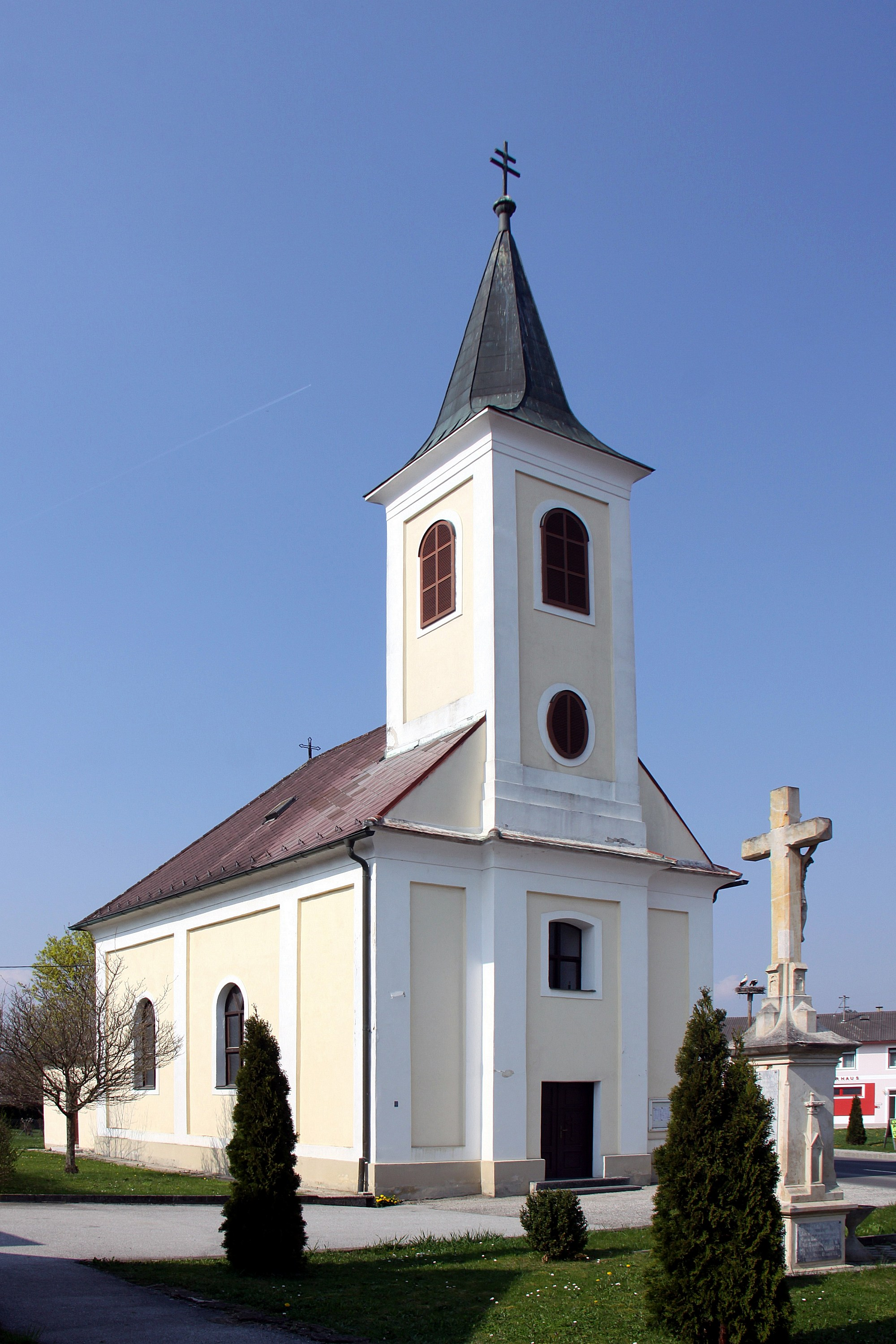 Mischendorf - Ortsteil Rohrbach an der Teich, Filialkirche Christi Himmelfahrt